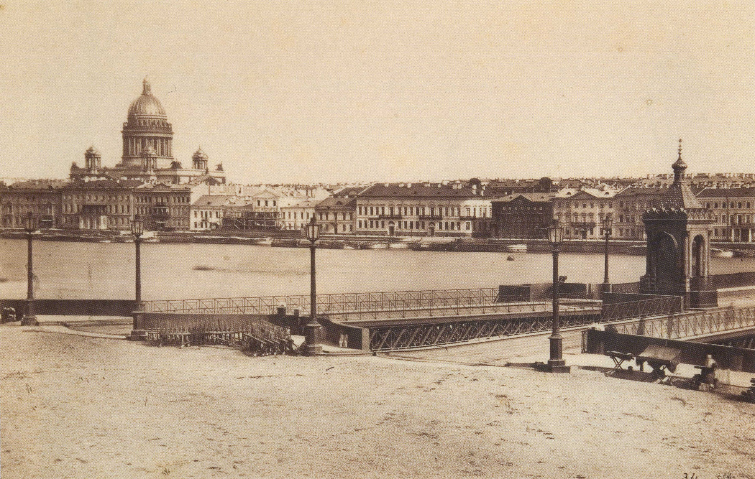 Николаевский мост через Неву и часовня св. Николая Чудотворца.